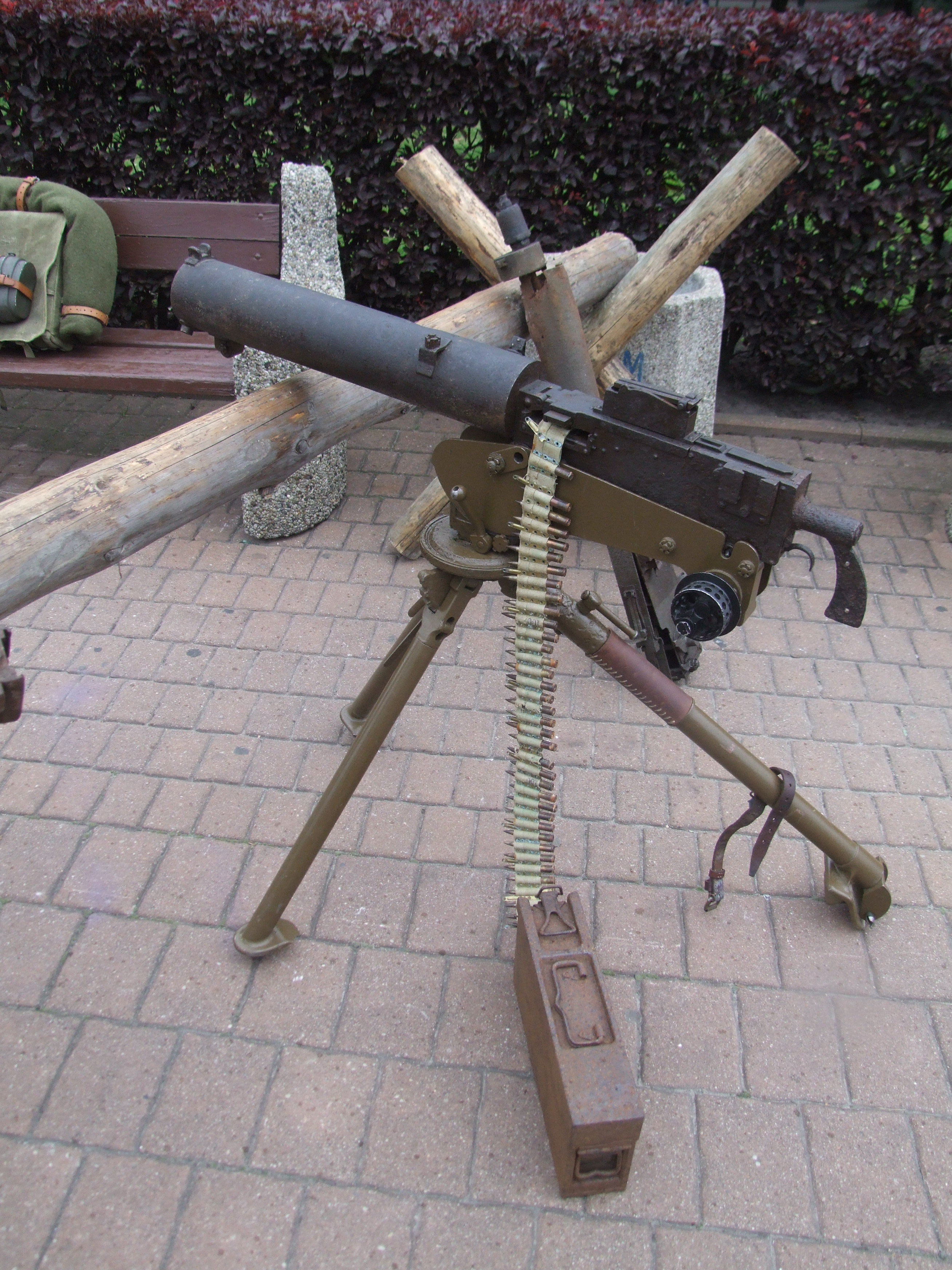 Święto Wojska Polskiego, Gdynia